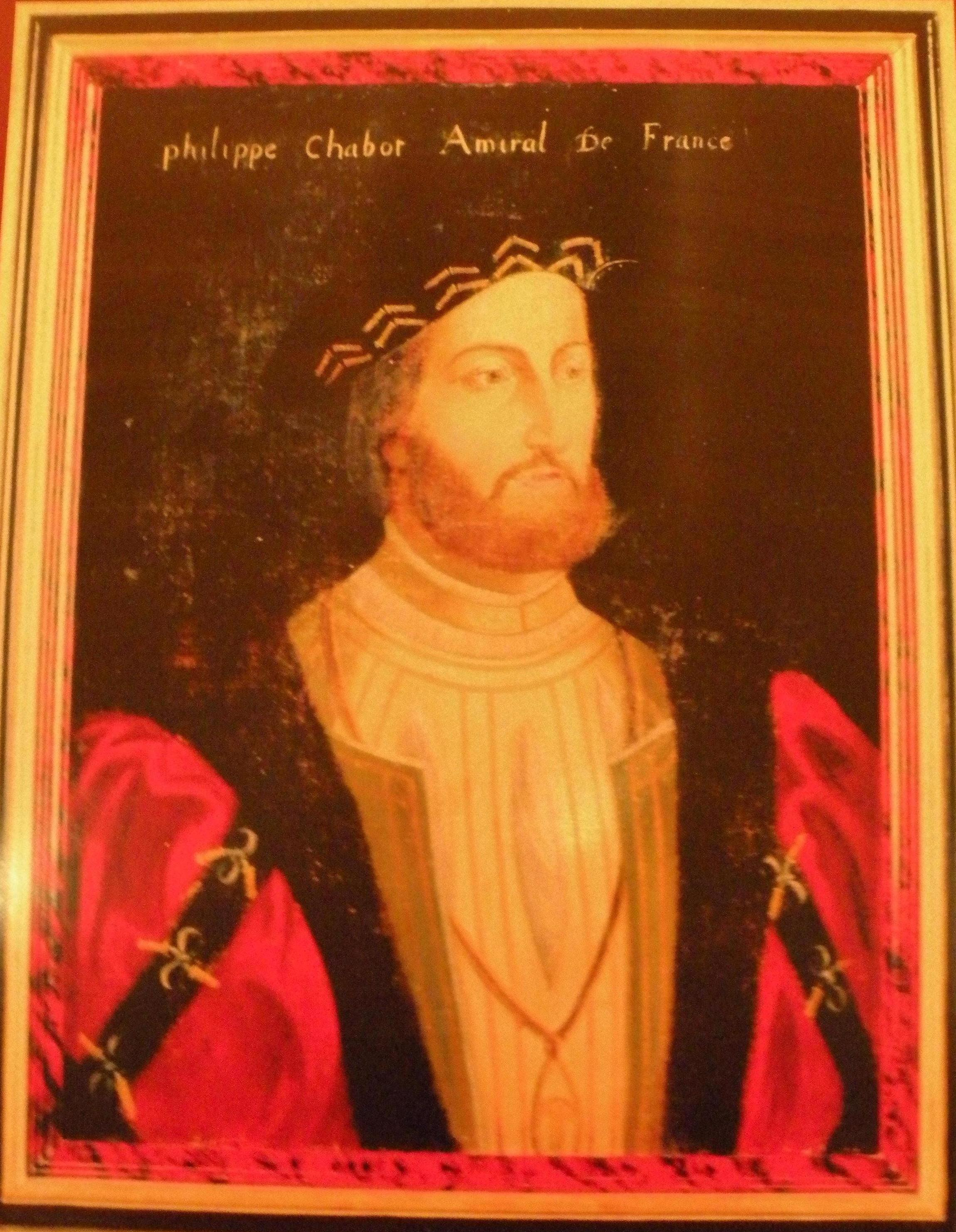 tableau de Philippe Chabot chateau d'apremeont vendée 2009-08-20 auteur=inconnue